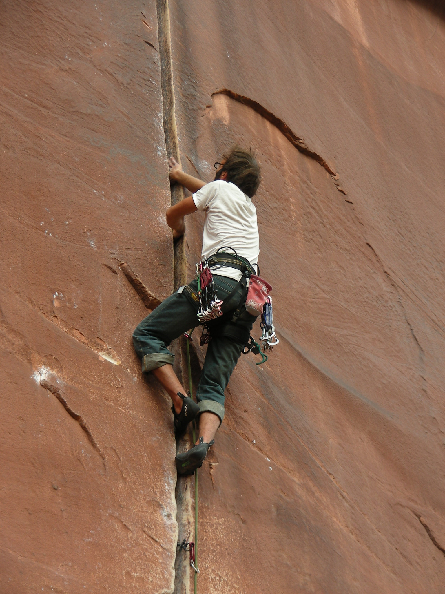 Indian Creek - Un habitué qui enchaine le Coyne Crack (5.11+ à doigts) à Supercrack Buttress